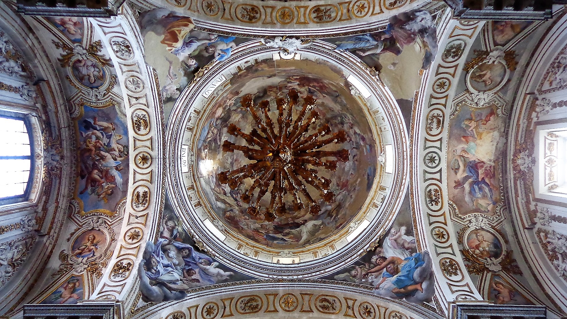 Transetto, crociera, cupola con Trionfo dell'Ordine domenicano e allegorie dei Continenti nei pennacchi.